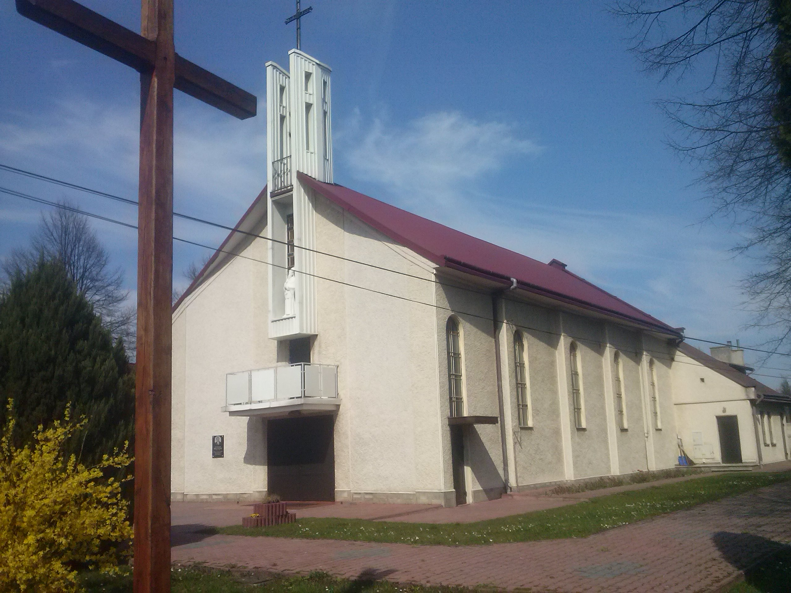 Kościół parafialny pw. św. Jadwigi Królowej z 1983 roku w Jagielle - widok od strony południowej